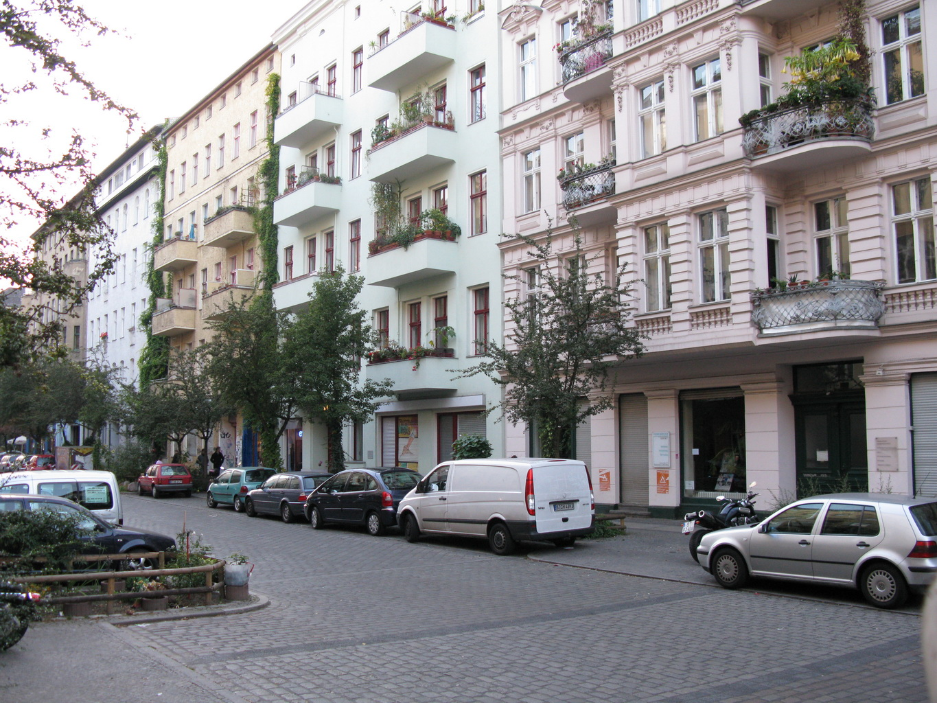 Gräfestraße in Berlin Kreuzberg